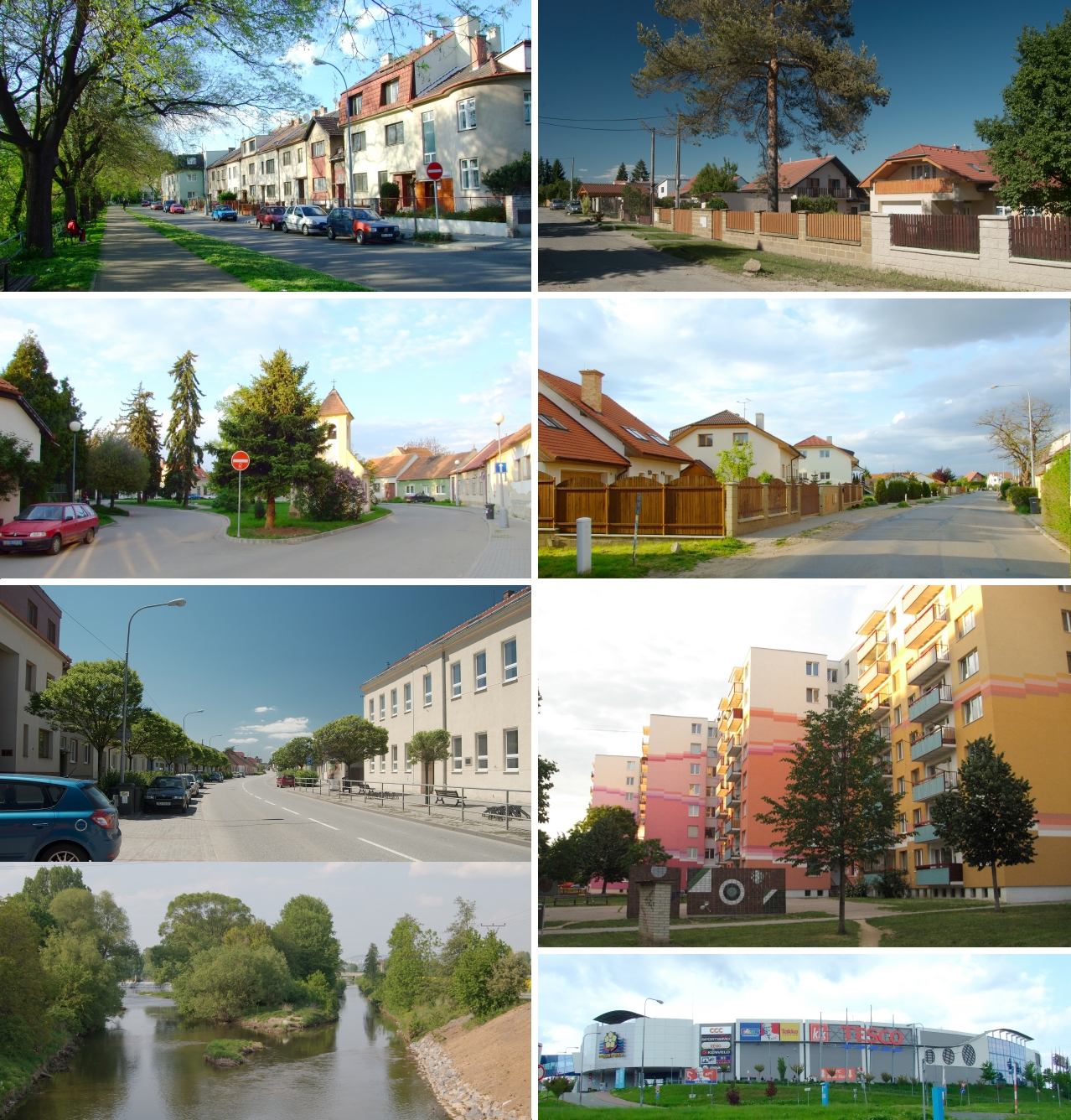 Brno-Komárov - poblíž Svratky ležící část Jeneweinovy ulice, v bývalé obci Malá Mariacela